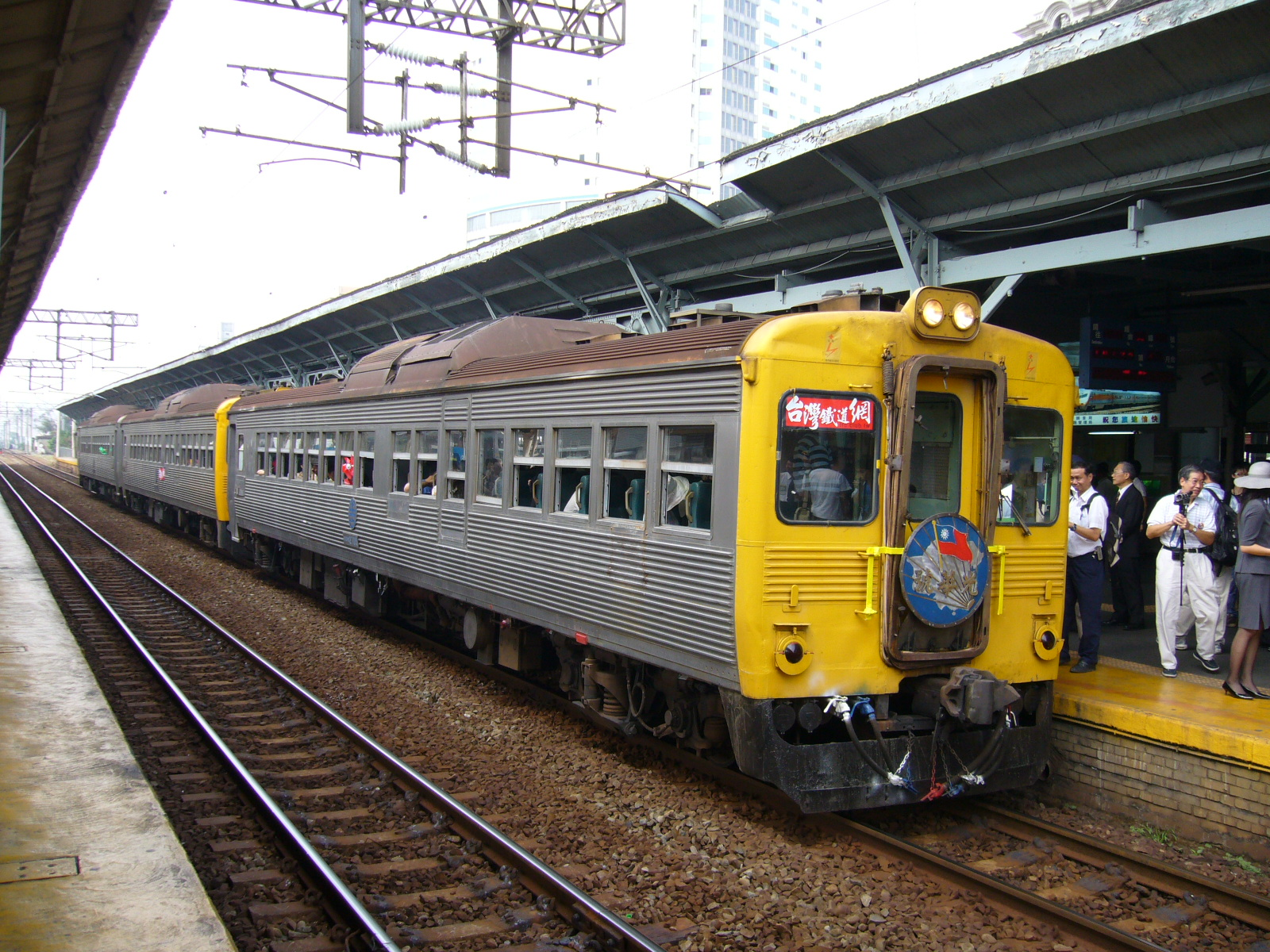 停靠臺灣縱貫線臺中車站的DR2700型。